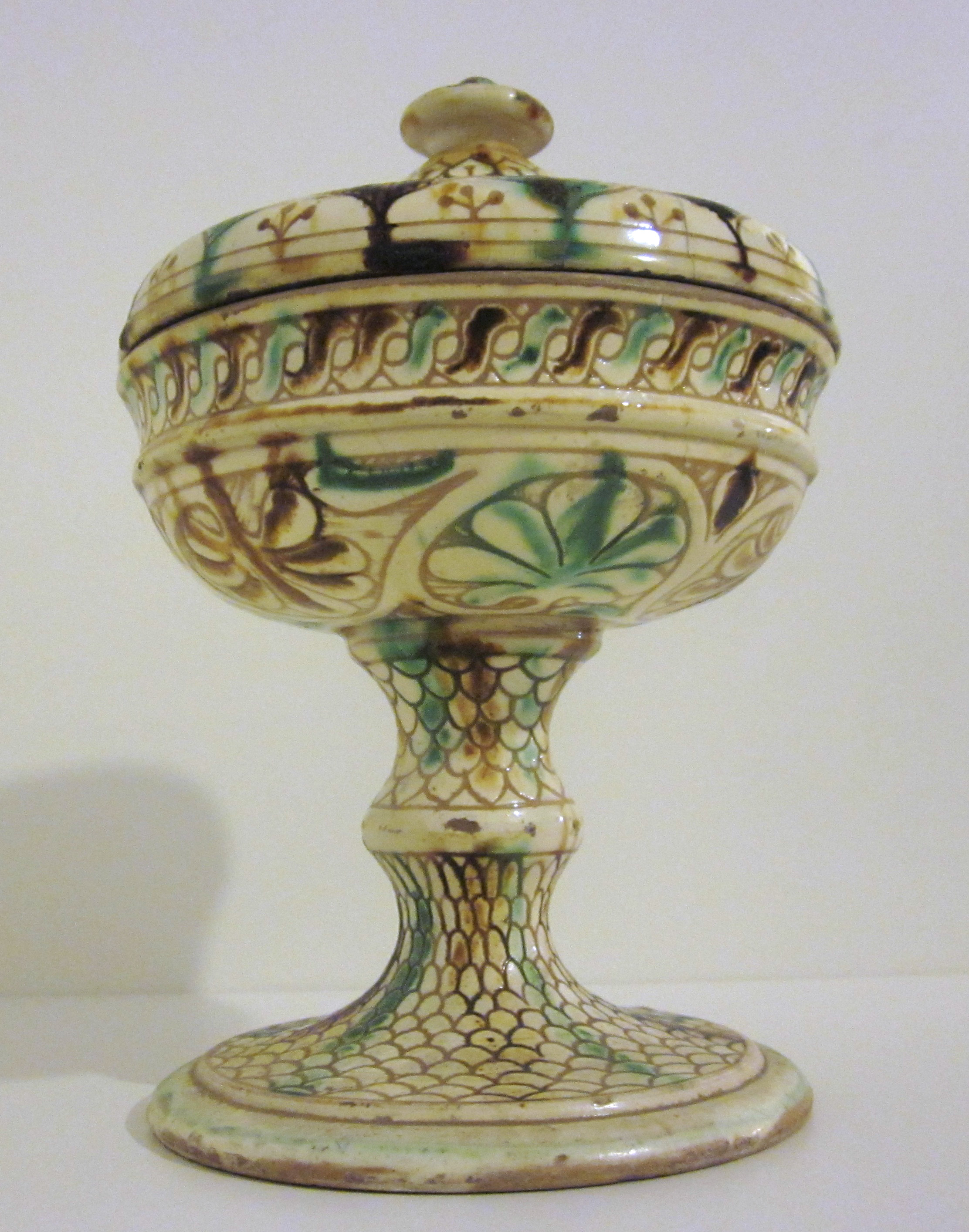 Calice con coperchio in ceramica ingobbiata graffita, attribuita alla ditta Carlo e Giano Loretz di Milano (1896-1906)